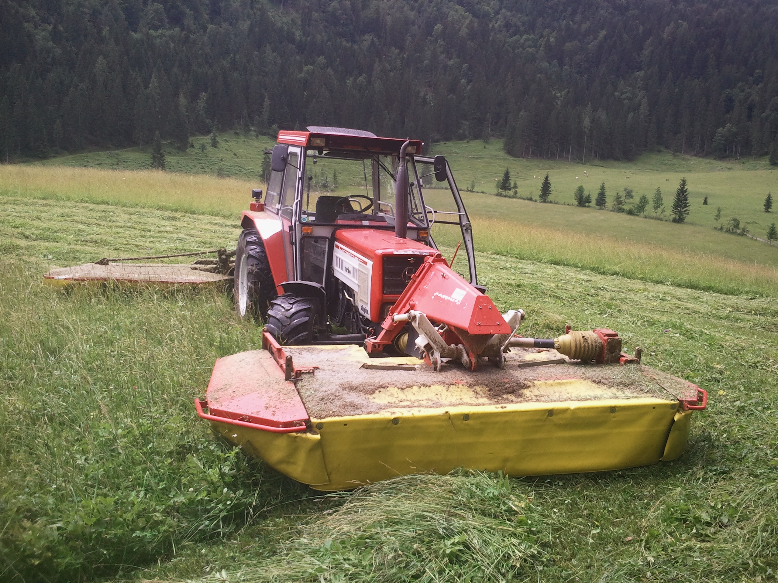 Mäh arbeit mit meinem 1600 Alpin Bj. 1996 mit Pöttinger Alpha motion 266 + Pöttinger Cat 190 in Schwierigem Gelände im Kaiserwinkel!